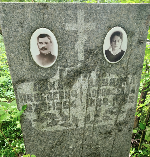 могила родителей Николая Лукича Голего.